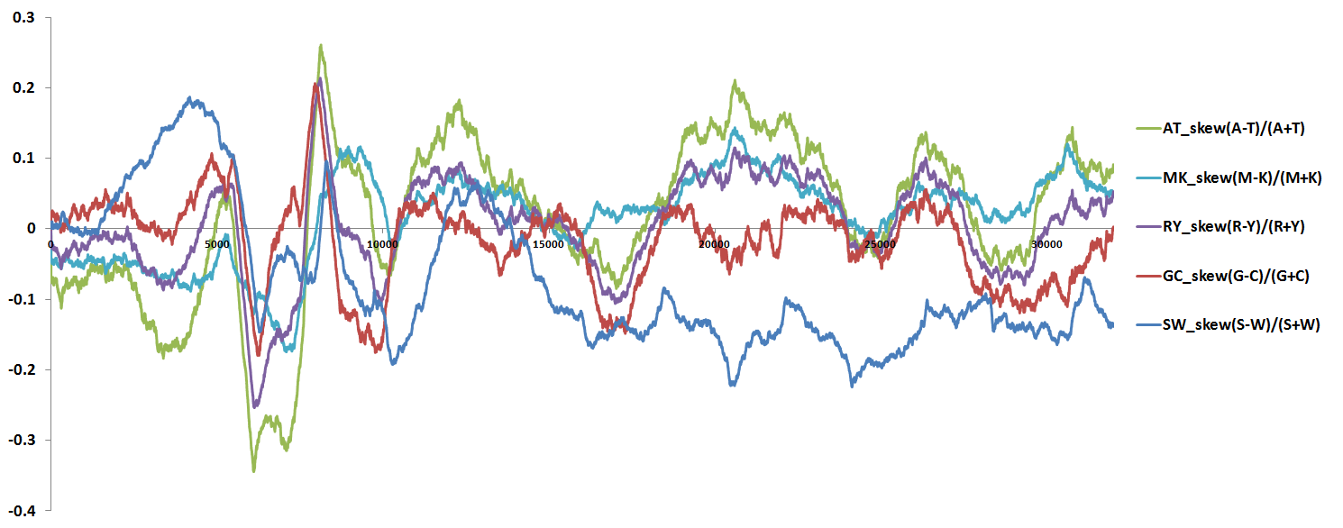 Сравнения смещений в нуклеотидном составе для рамки в 2000 нуклеотидов, для фрагмента ДНК в 32 тыс нуклеотидов. На оси Х координаты в нуклеотидах, на оси Y величины смещений.